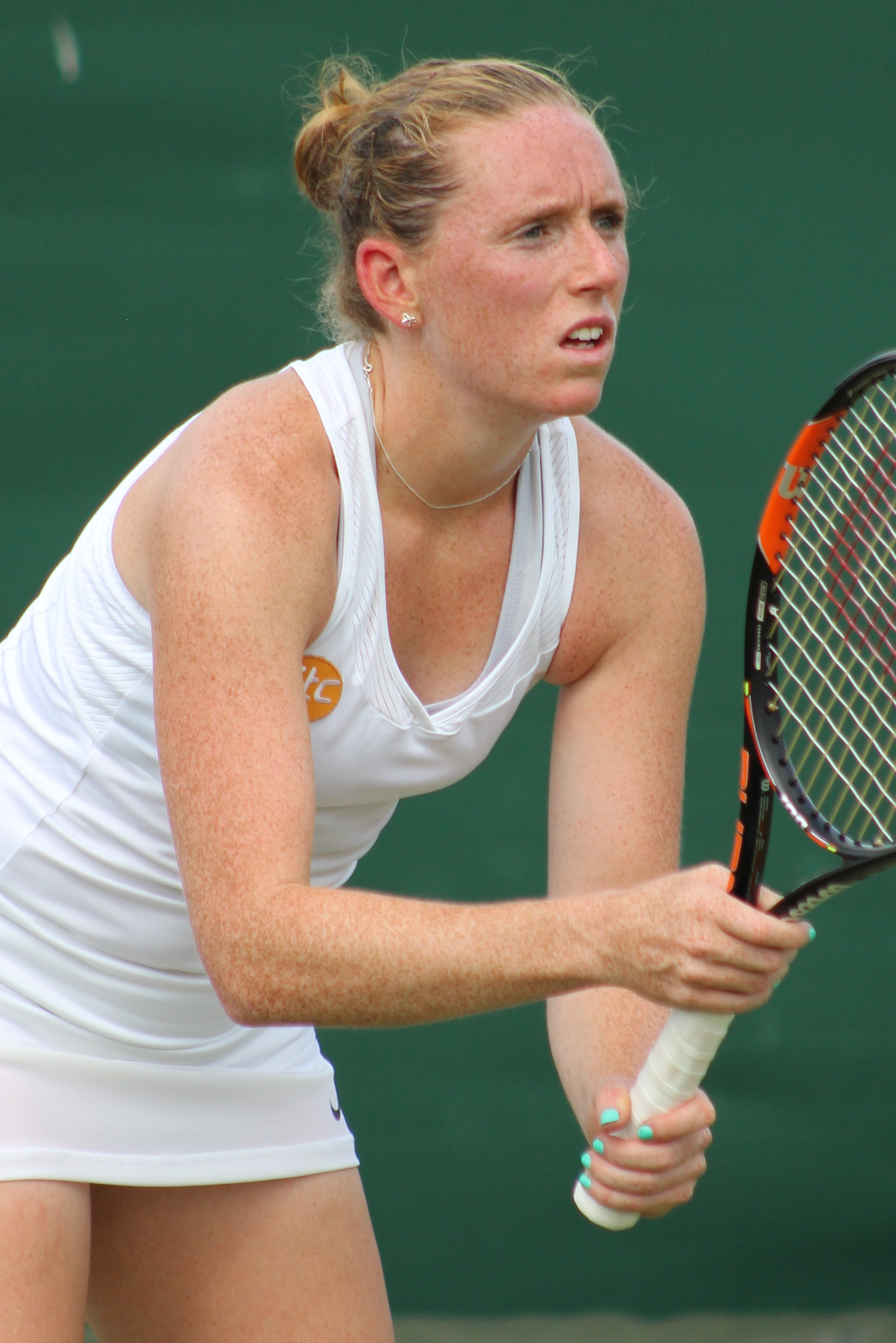 Cavaday WMQ15 (3)